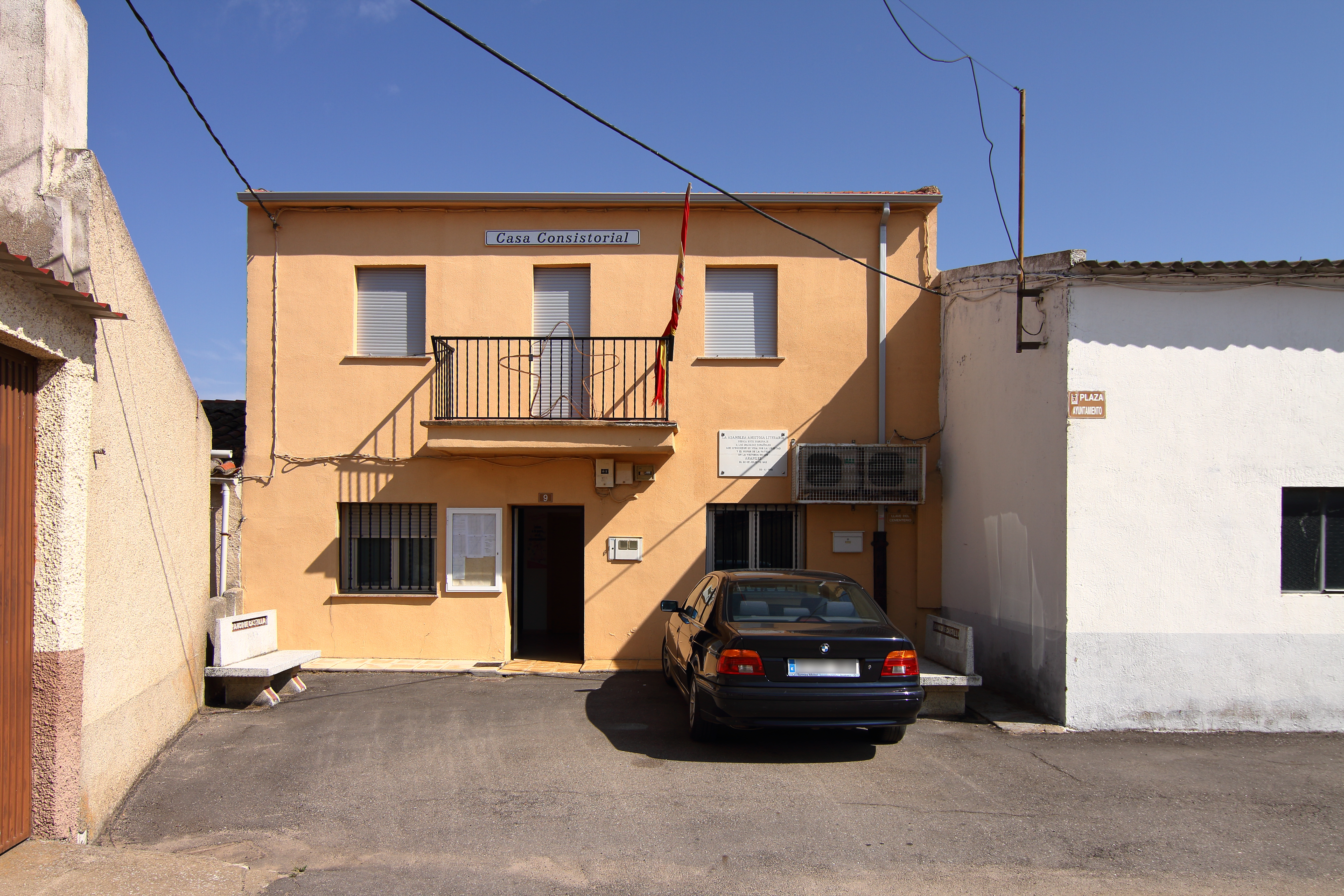 Casa Consitorial de Arapiles